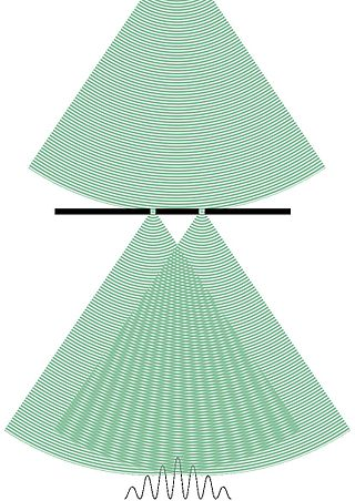 Ինտերֆերենցիոն պատկեր